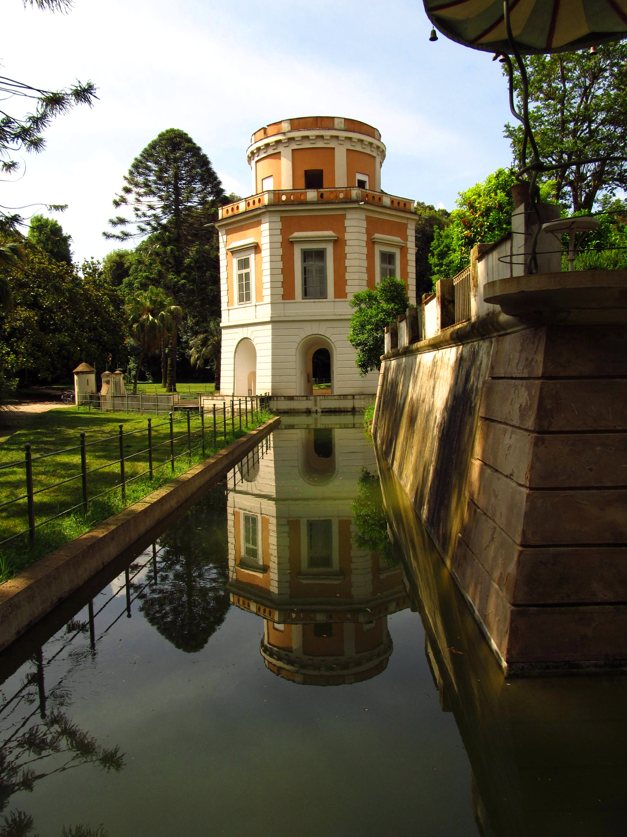 castelluccia, nel bosco vecchio della reggia di Caserta